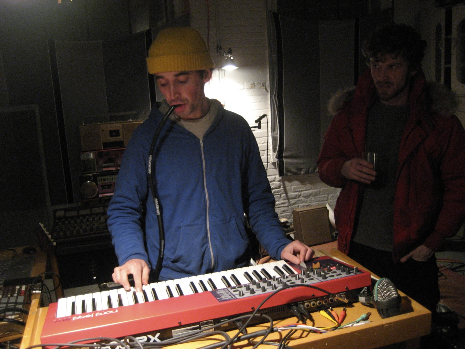 talkbox